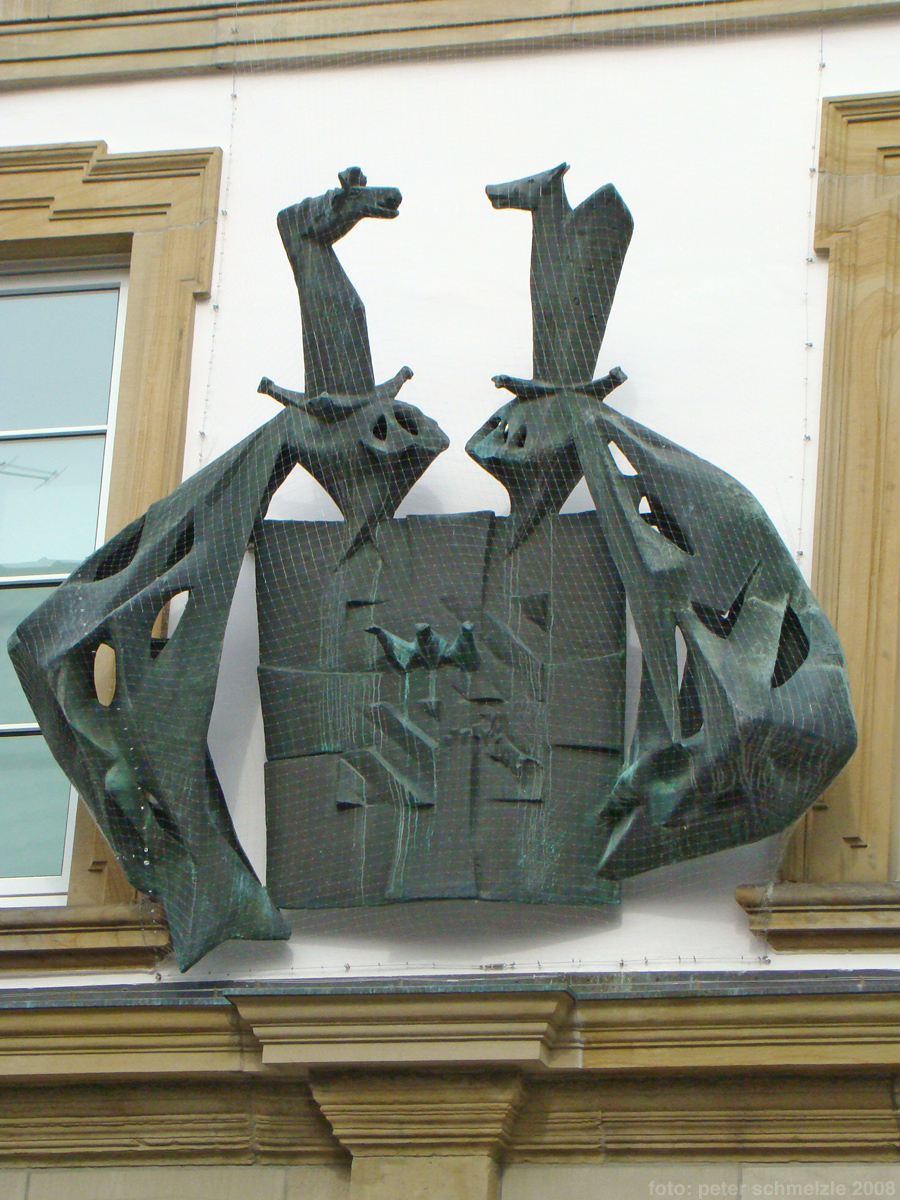 Stlisiertes Deutschordens-Wappen am Deutschhof in Heilbronn, das von der Stuttgarter Bildhauerin Gertrud Angelika Wetzel geschaffen wurde.(Artikel im Neckar-Echo vom 15.8.1962 Nr. 187, S. 5 Über dem Toreingang zu Deutschhof...)